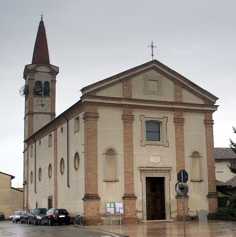 Madignano - Chiesa Parrocchiale di San Pietro in Vincoli Author: EMME3 - Madignano - Italy